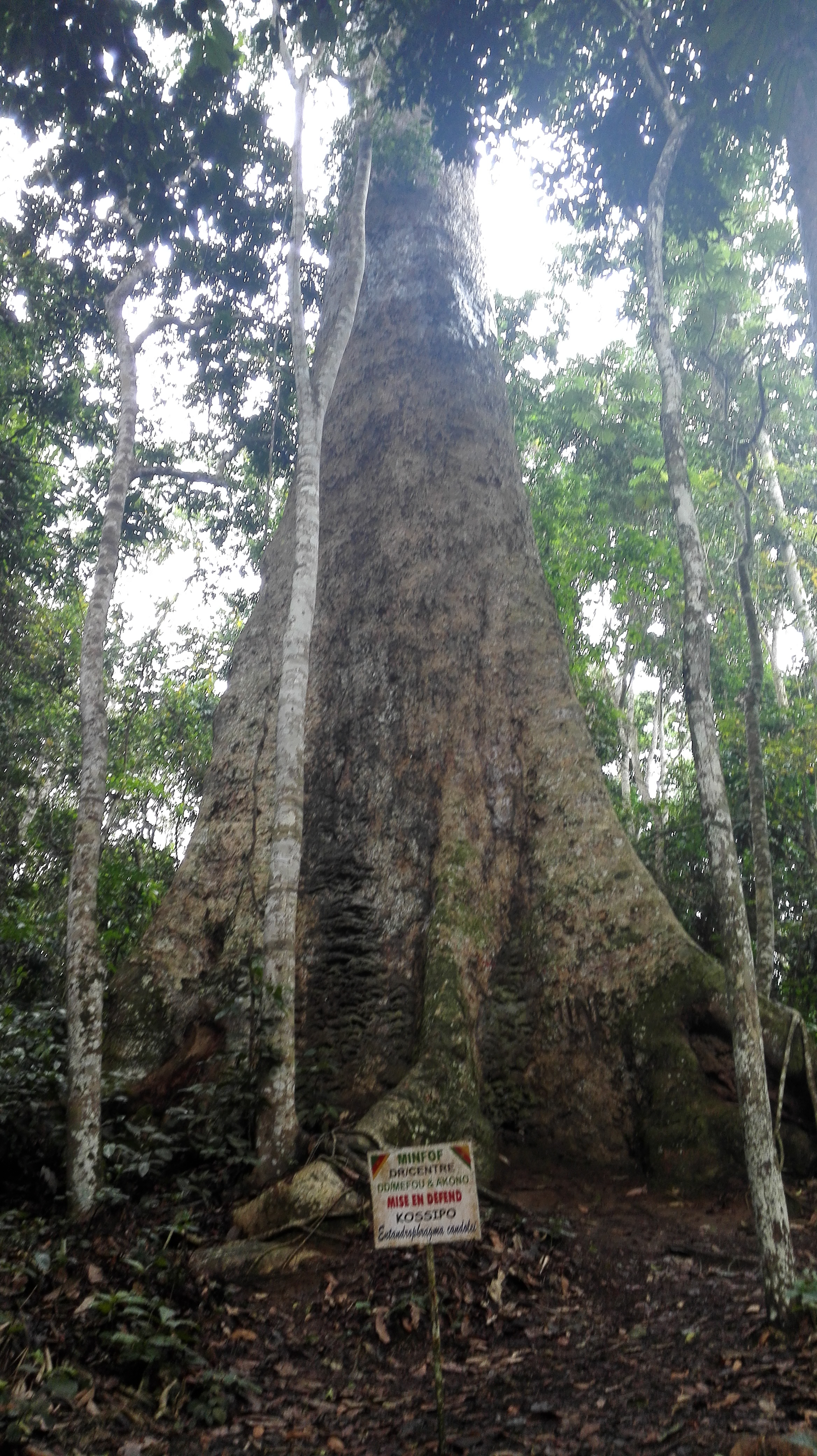 Vue partielle de l'arbre millénaire Kossipo (1176 ans environs), Attaction principale du Site écotouristique d'Ebogo,Mefou - Et- Akono, Région du Centre, Cameroun.